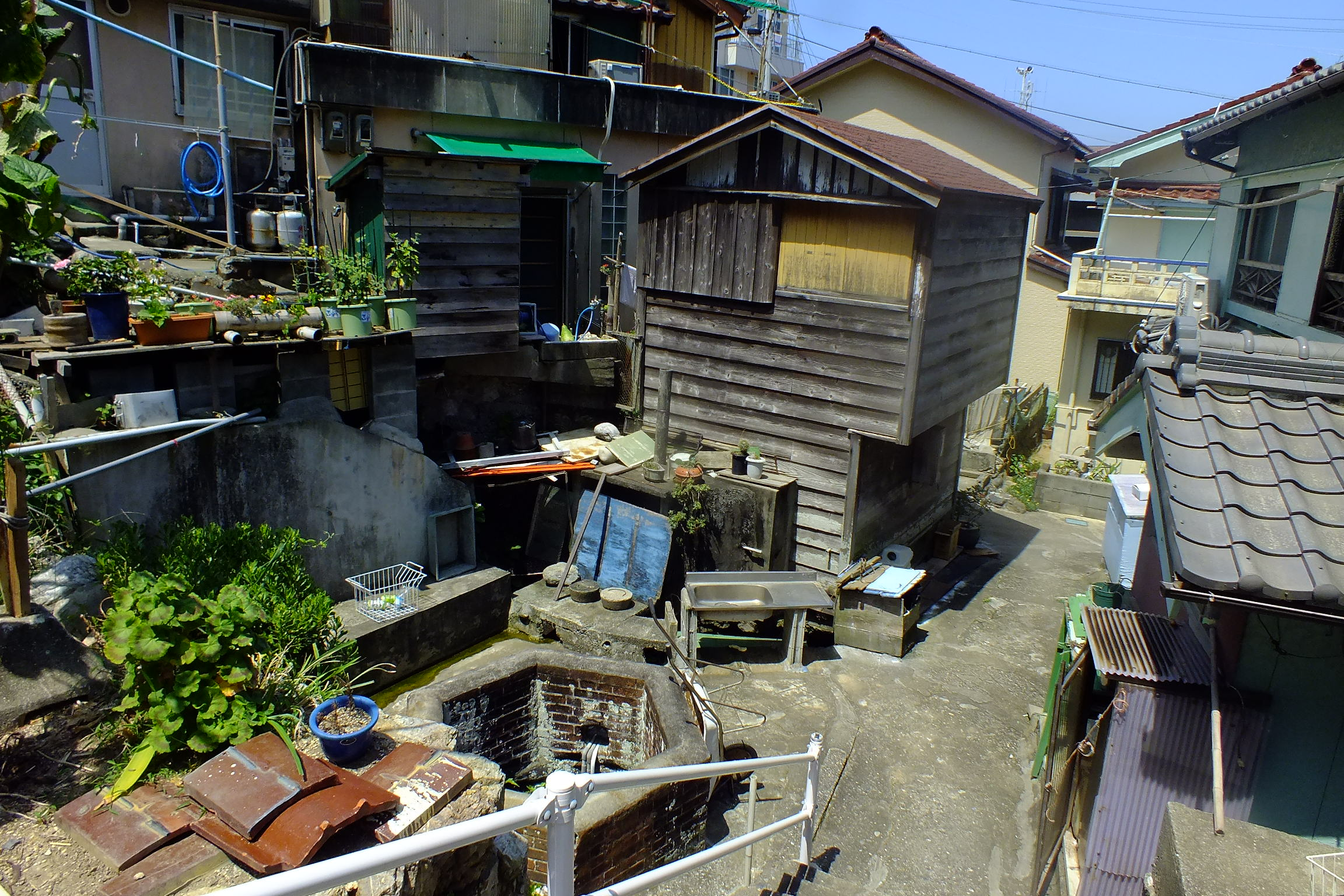 2016-08-05 Kami Island (Mie) 神島の民家・路地